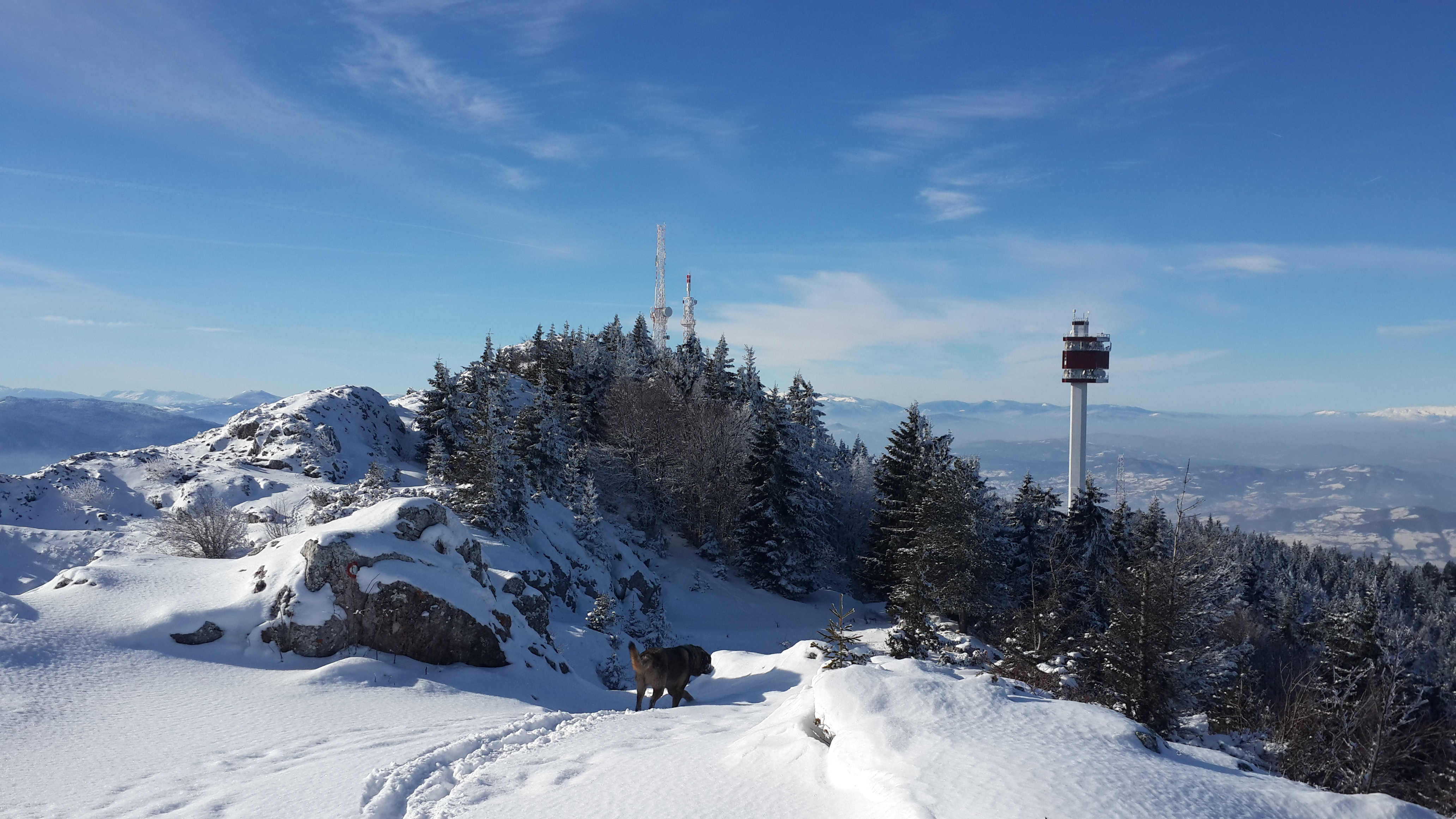 Obasjani ljepotan!